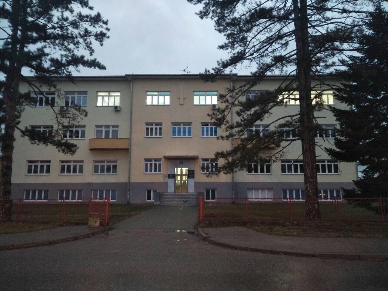 Zgrada gimnazije u Derventi.